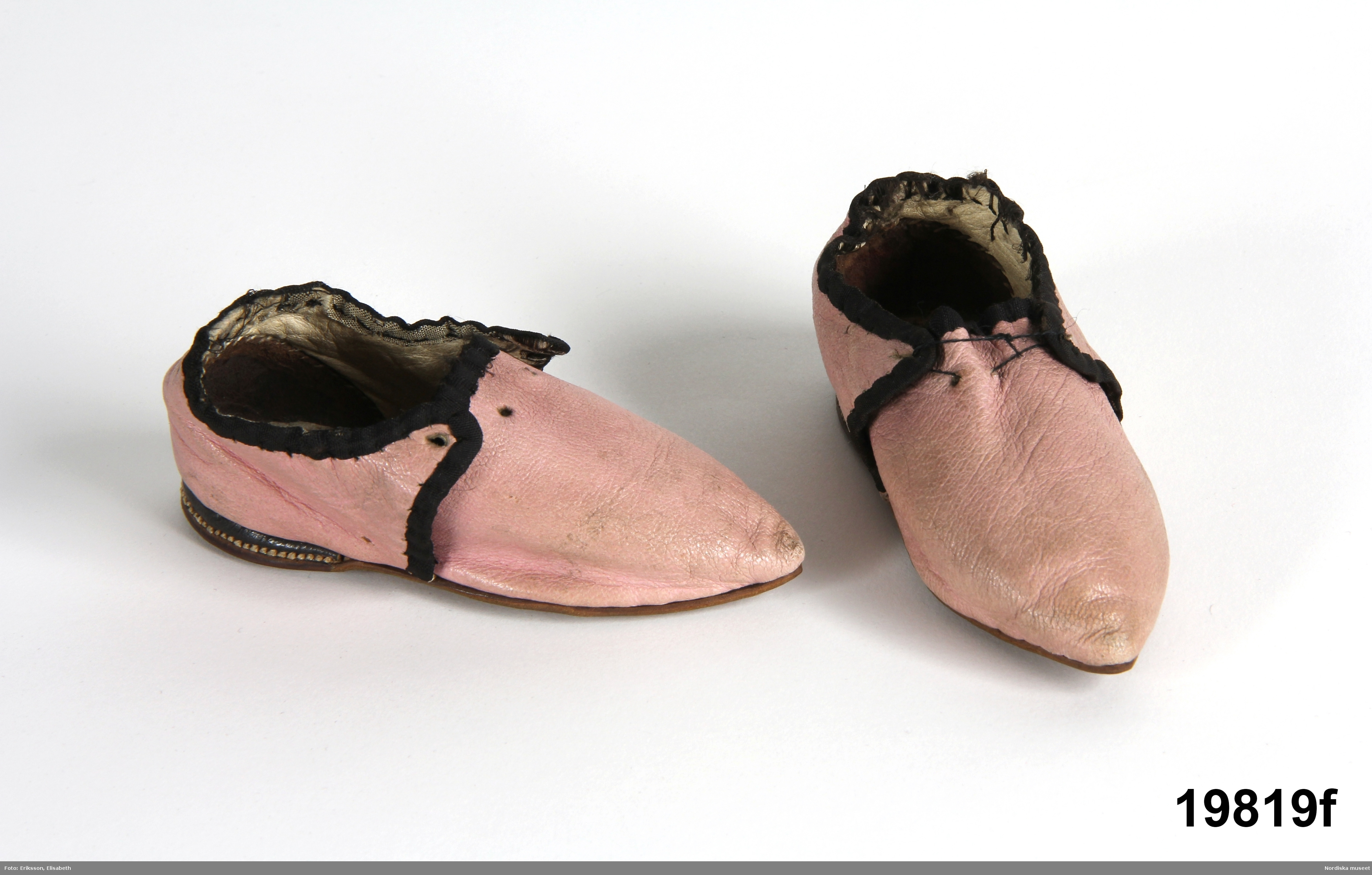 Daabsdrägt